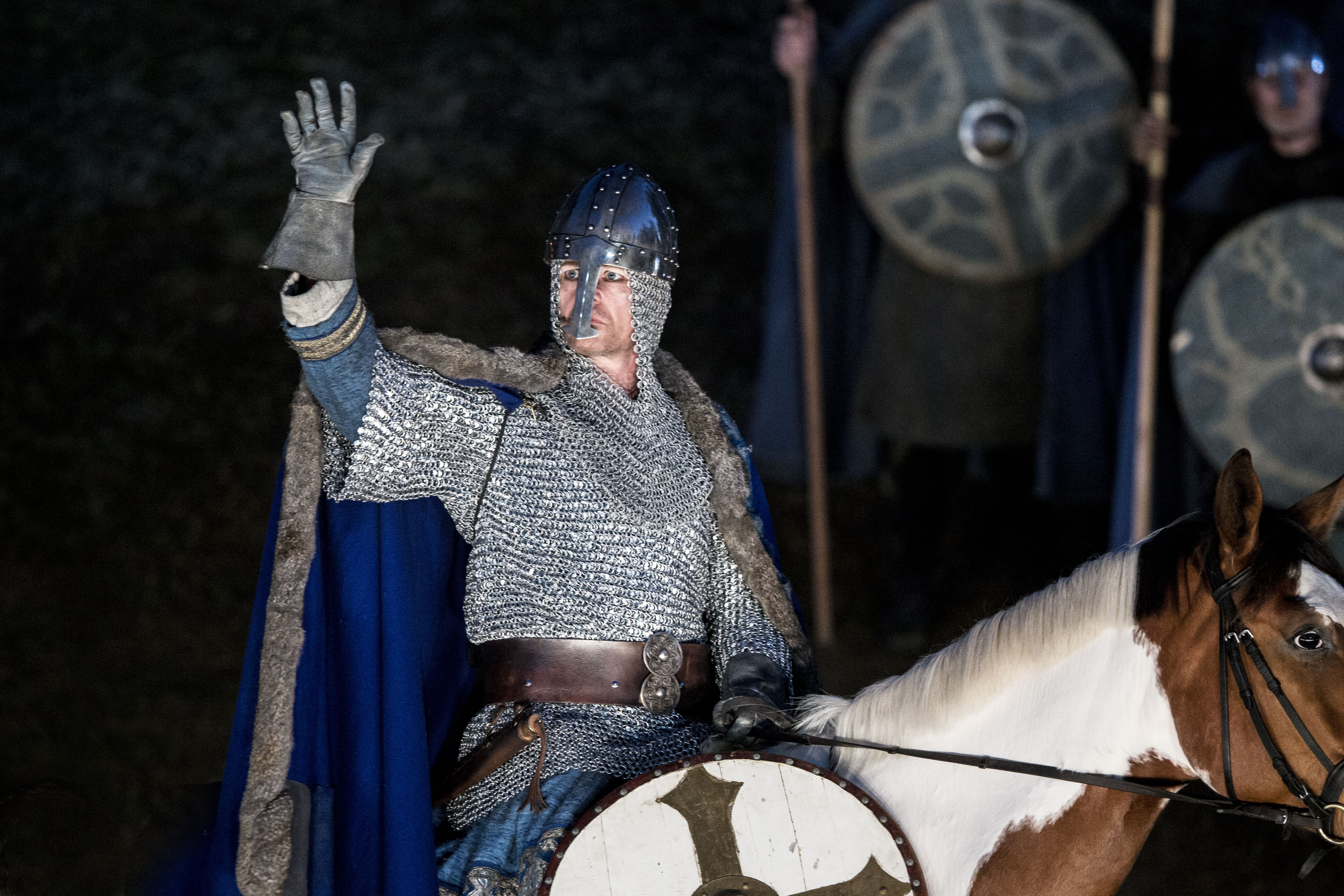 Norwegian actor Henrik Mestad as king Olaf II of Norway in the The Saint Olav Drama at Stiklestad 2013.